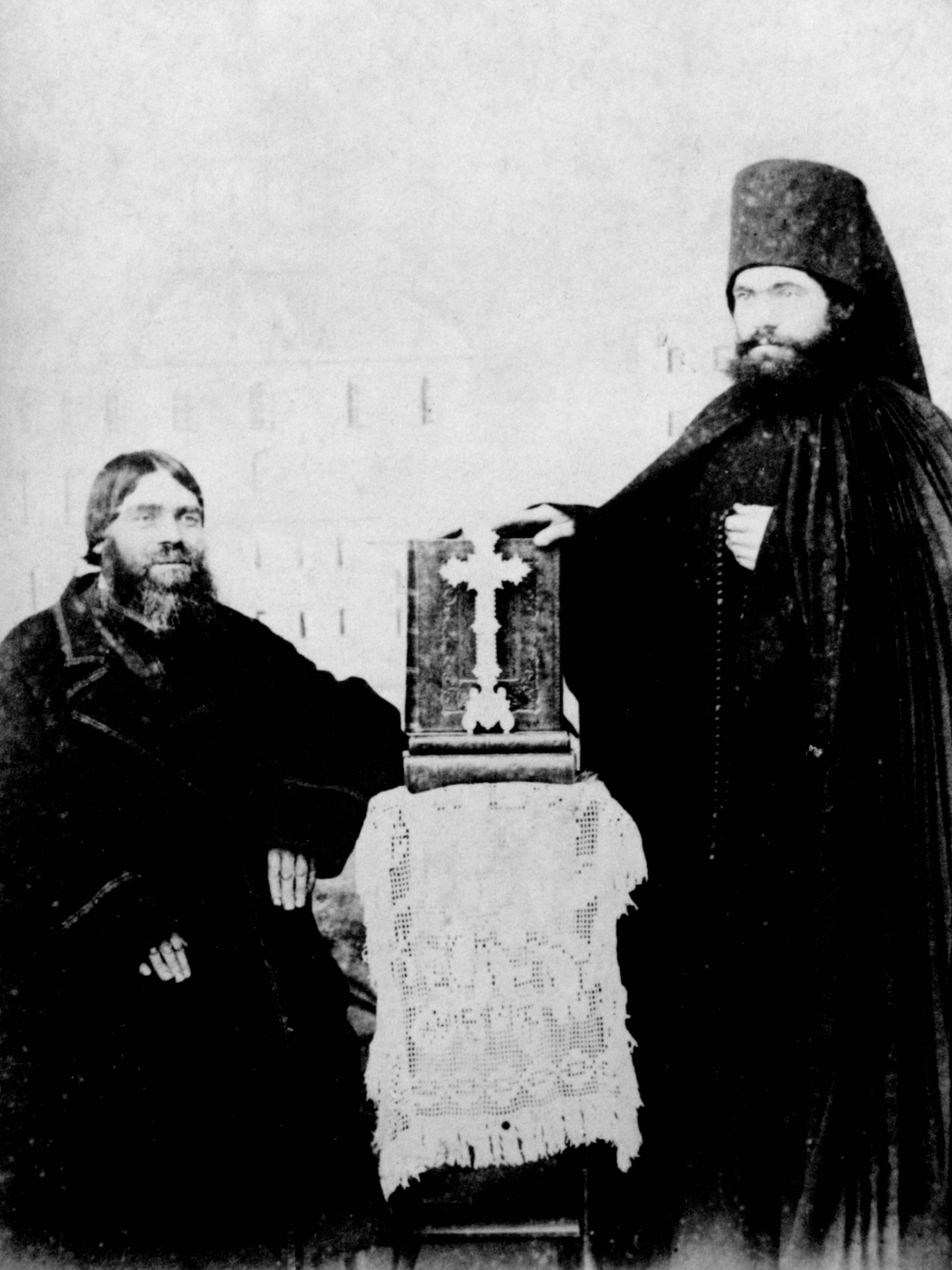 о. Иларион с отцом на фоне монастыря